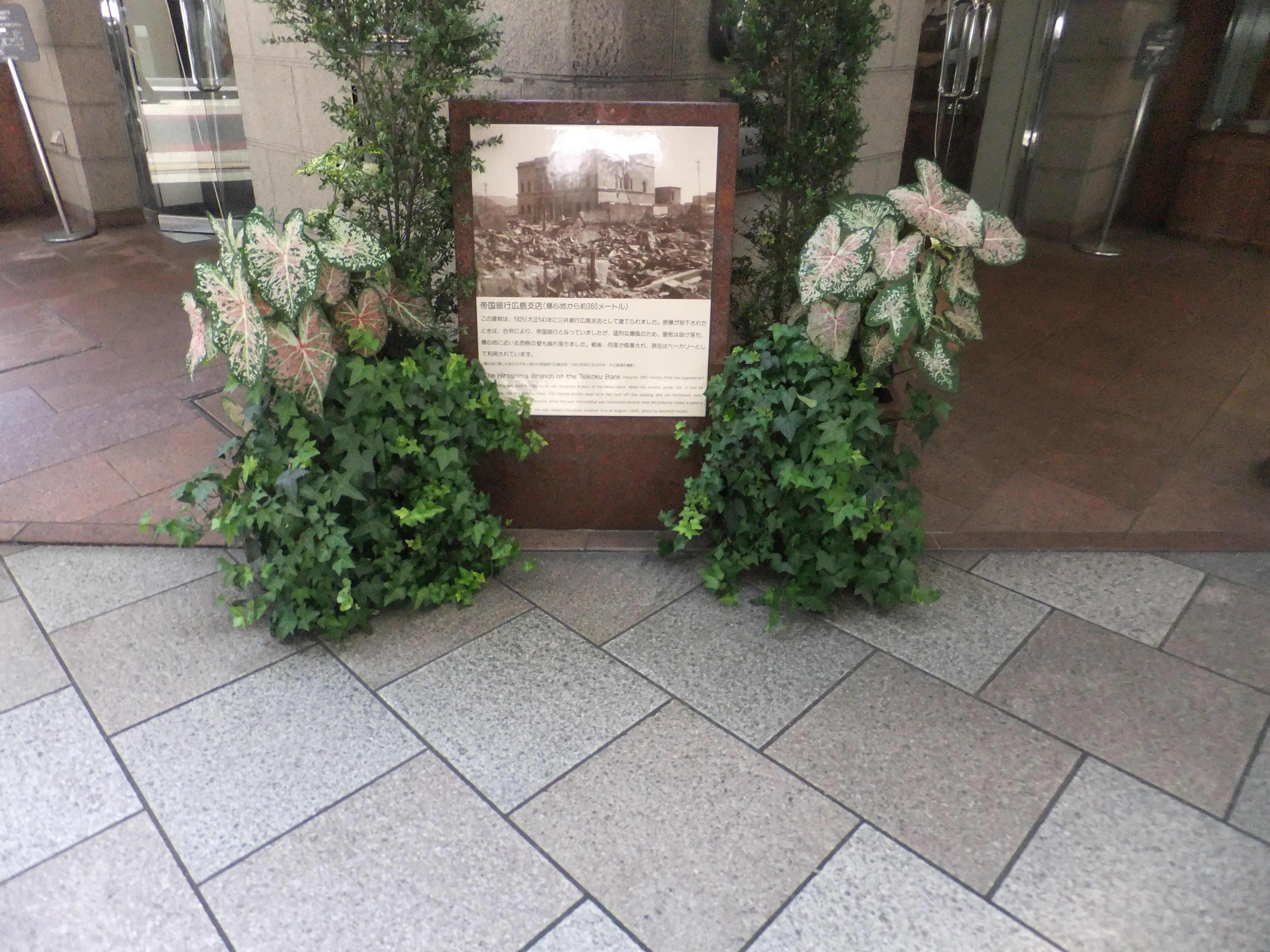 旧帝国銀行広島支店